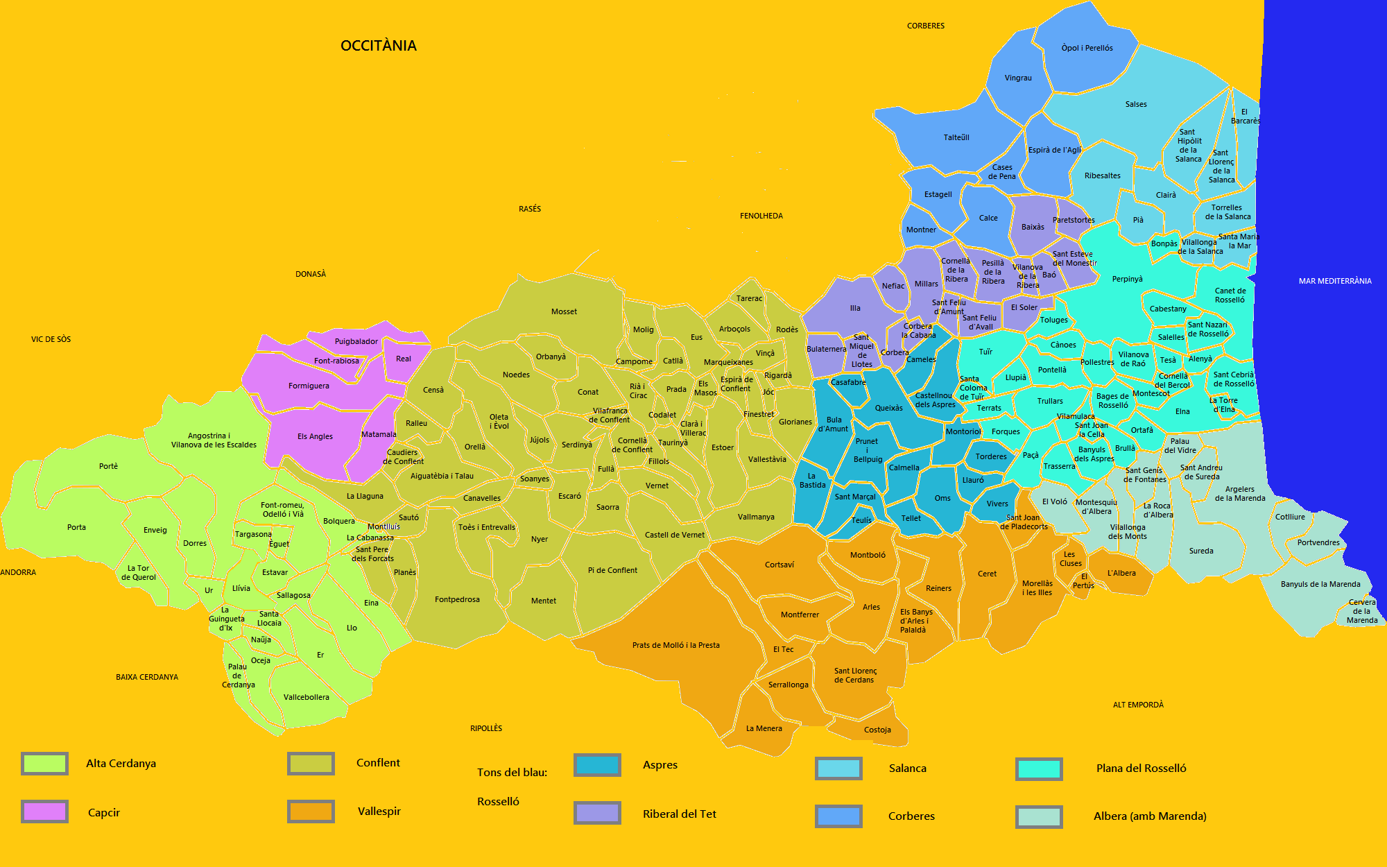 Mapa de les comarques i comunes de la Catalunya Nord prenent com a base un mapa existent de lliure disposició.